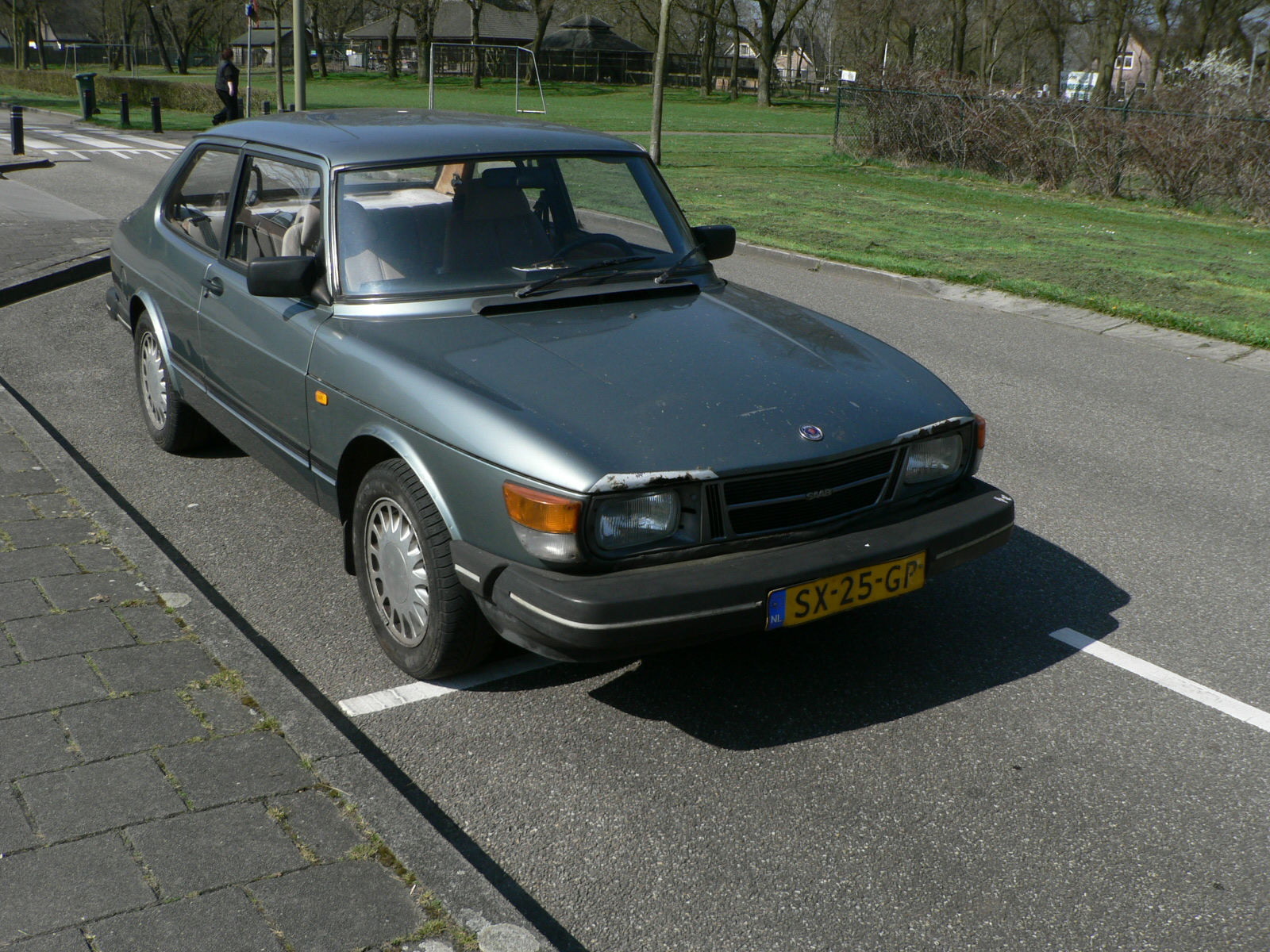 SX-25-GP